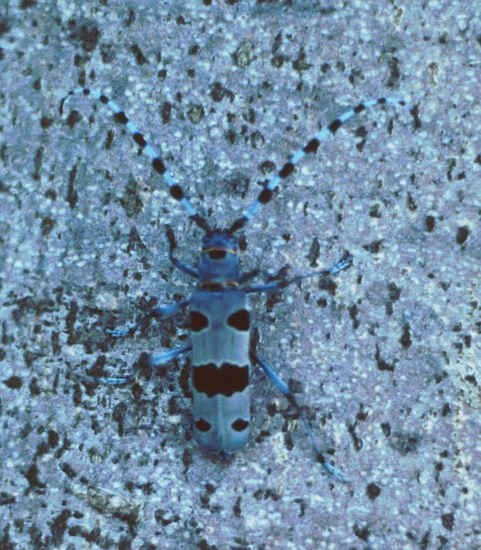 Alpenbock (Rosalia alpina), Bockkäfer (Cerambycidae), auf dem Stamm einer Buche (Fagus sylvatica) sitzend - Österreich/Austria/Autriche: Niederösterreich, Geißberg bei Merkenstein, W Bad Vöslau